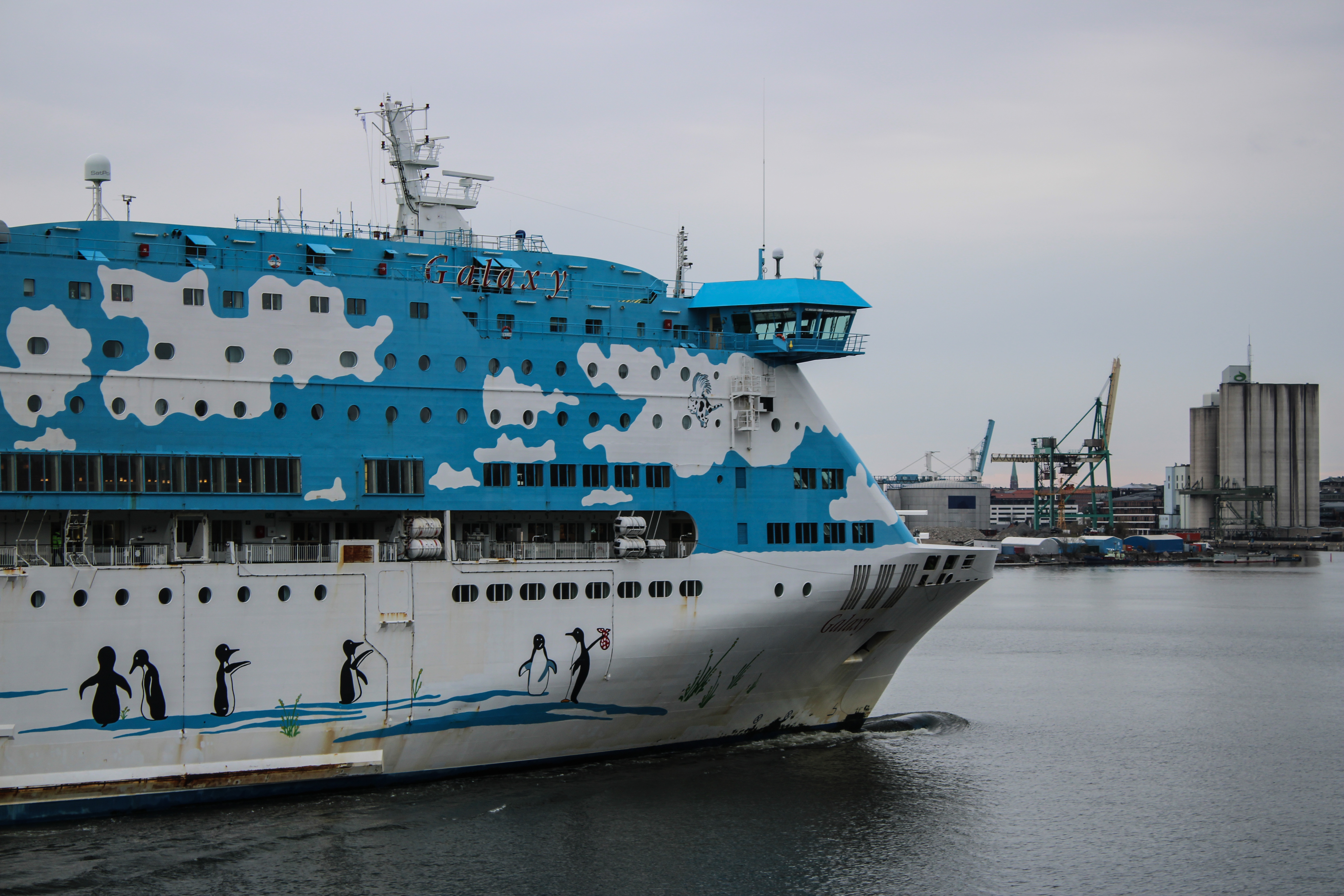 M/S Galaxy på väg in till Stockholm